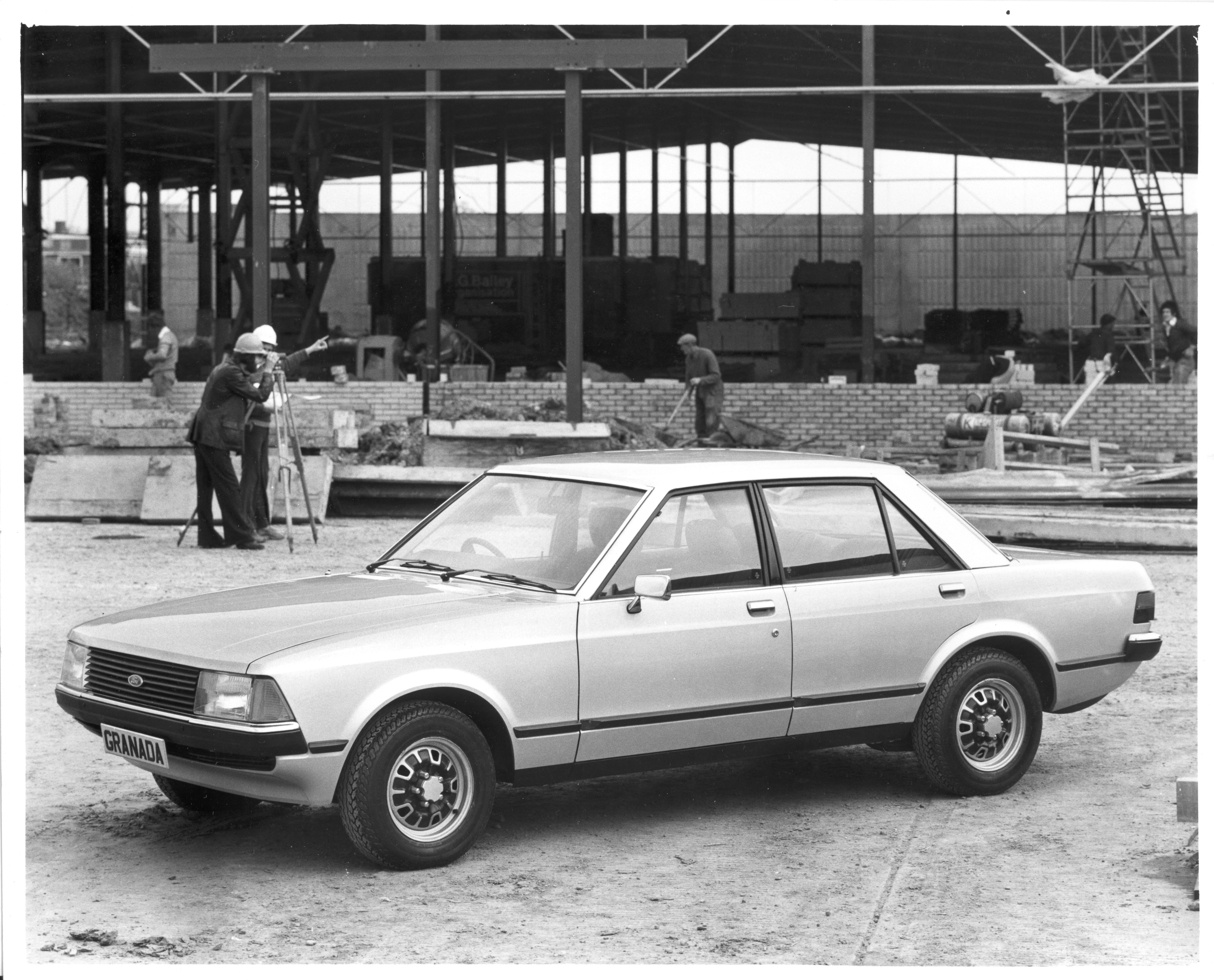 1978 Granada L saloon